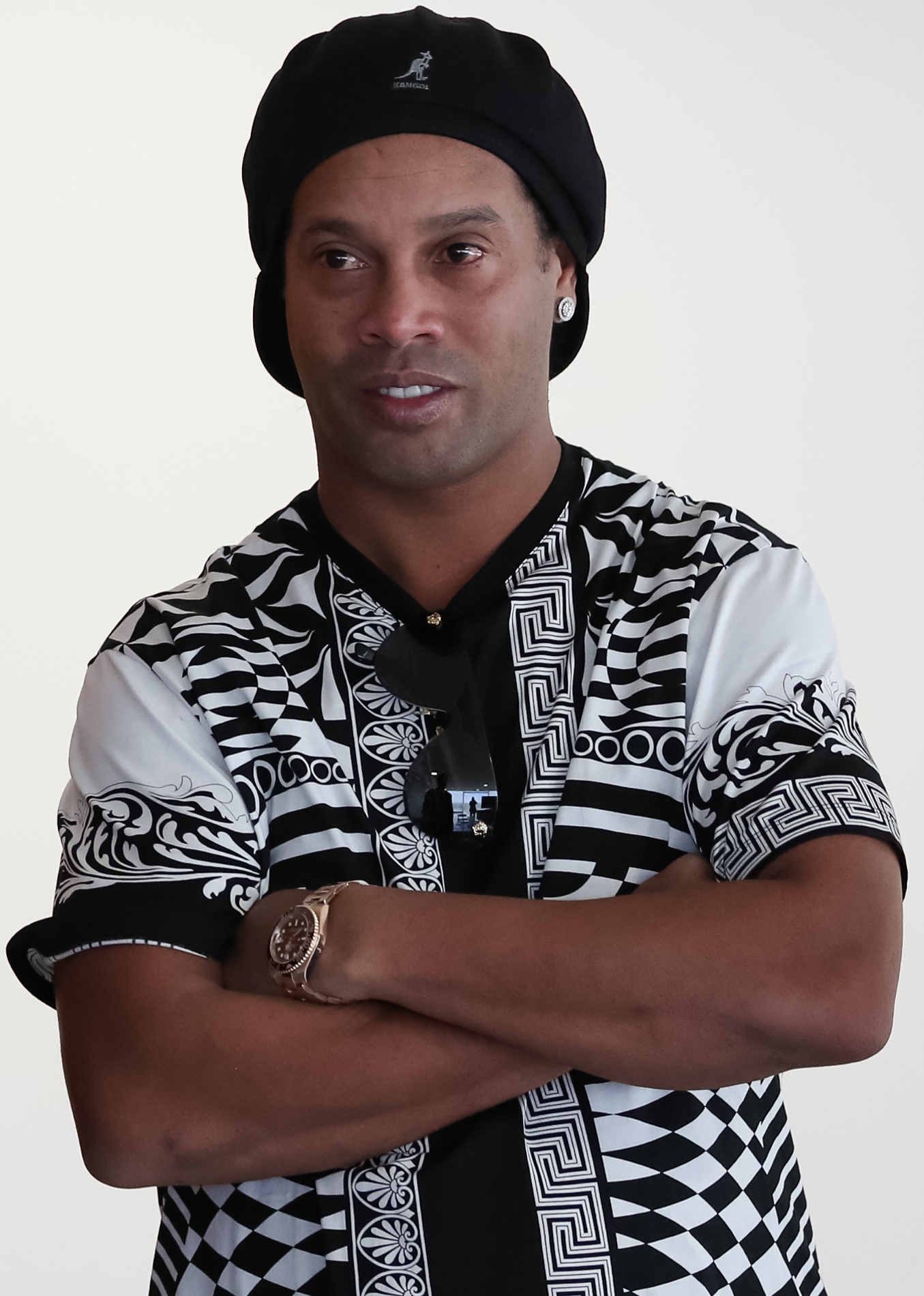 (Brasília - DF, 17/06/2019) Encontro com Gilson Machado, Presidente do Instituto Brasileiro do Turismo; e Ronaldinho Gaúcho, ex-jogador de futebol.